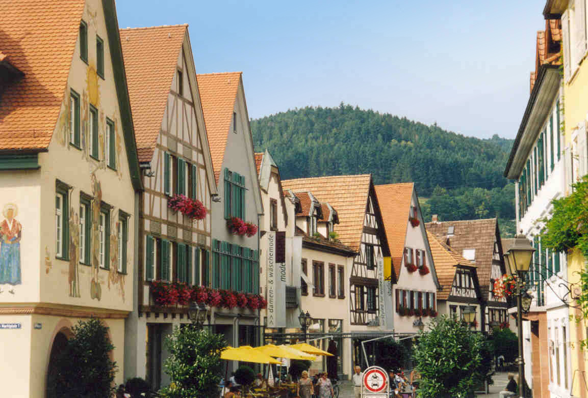 Haslach im Kinzigtal : Blick in die Stadtmitte. Die Hauptstraße weist noch einige Fachwerkbauten auf. Reizvoll die generelle Giebelständigkeit. Links das Rathaus.